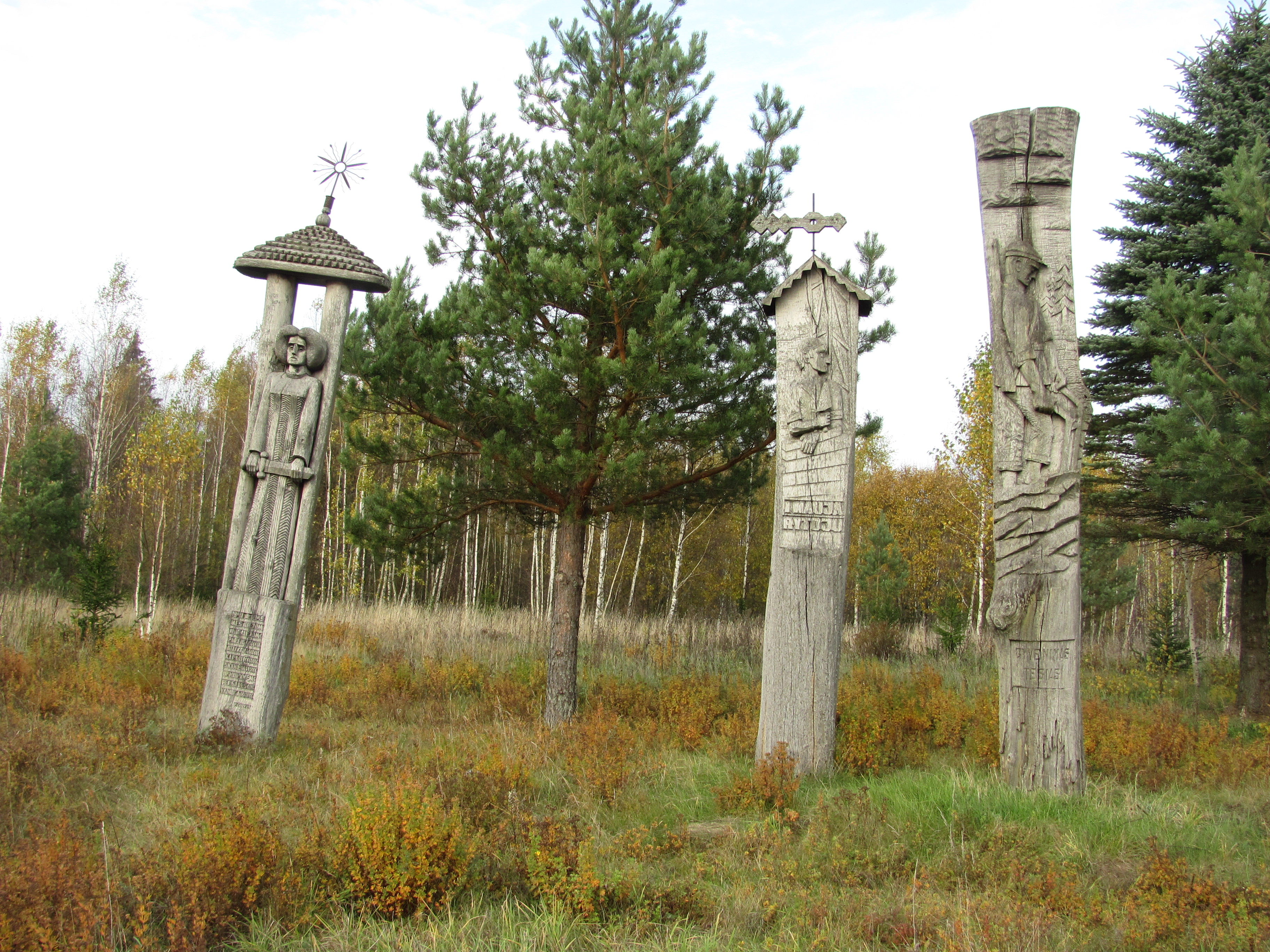 Rokiškio kaimiškoji sen., Lithuania